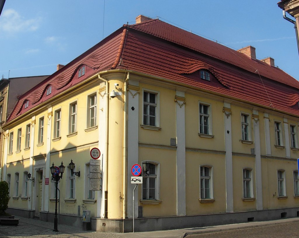 Kamienica ul. Długa 41 w Bydgoszczy, róg ul. Jana Kazimierza